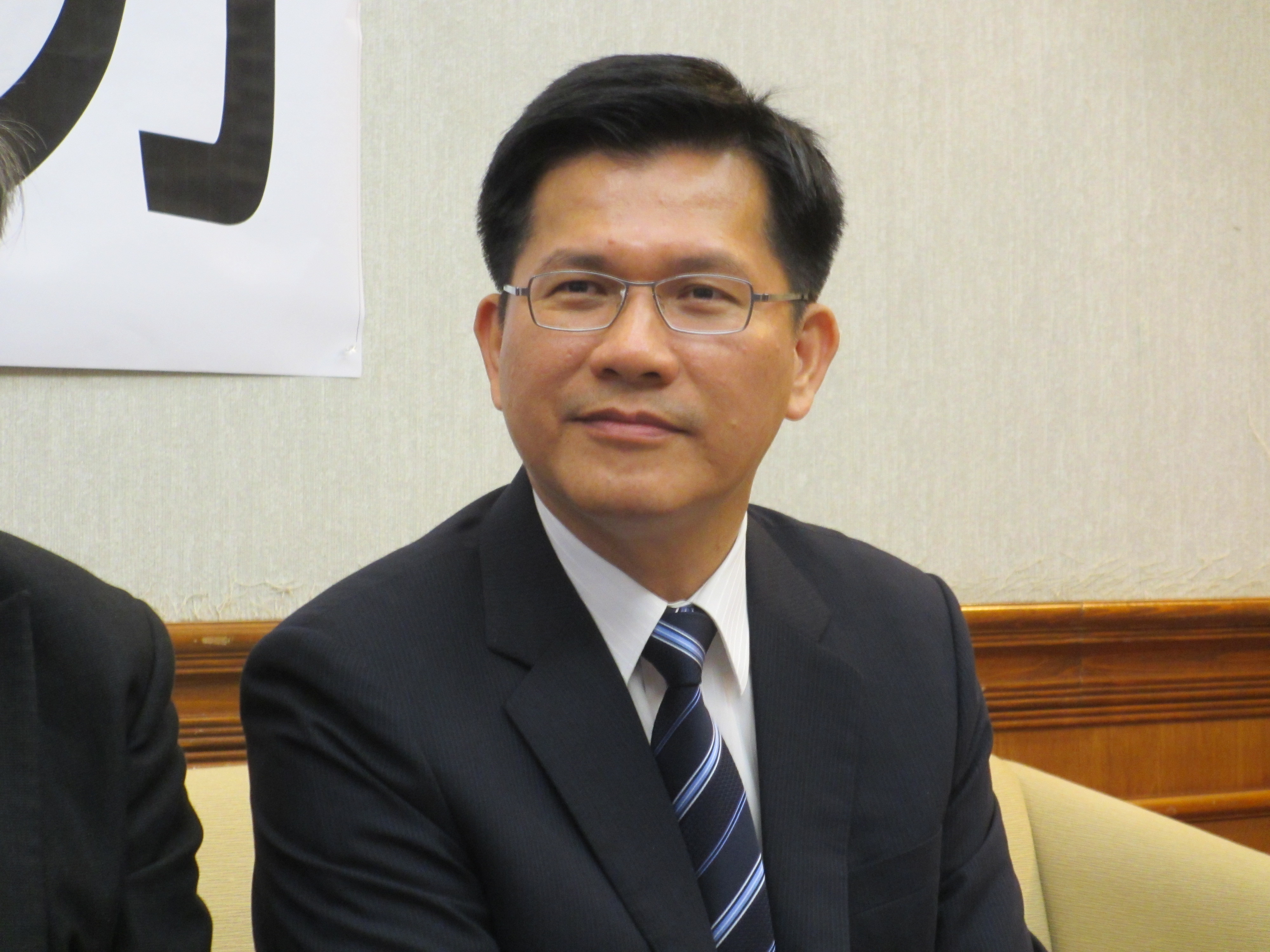 台灣在野黨民進黨立委林佳龍。